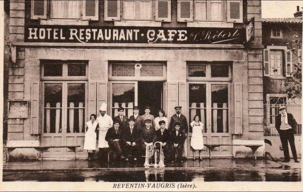 Hotel-Restaurant de Reventin-Vaugris en 1910